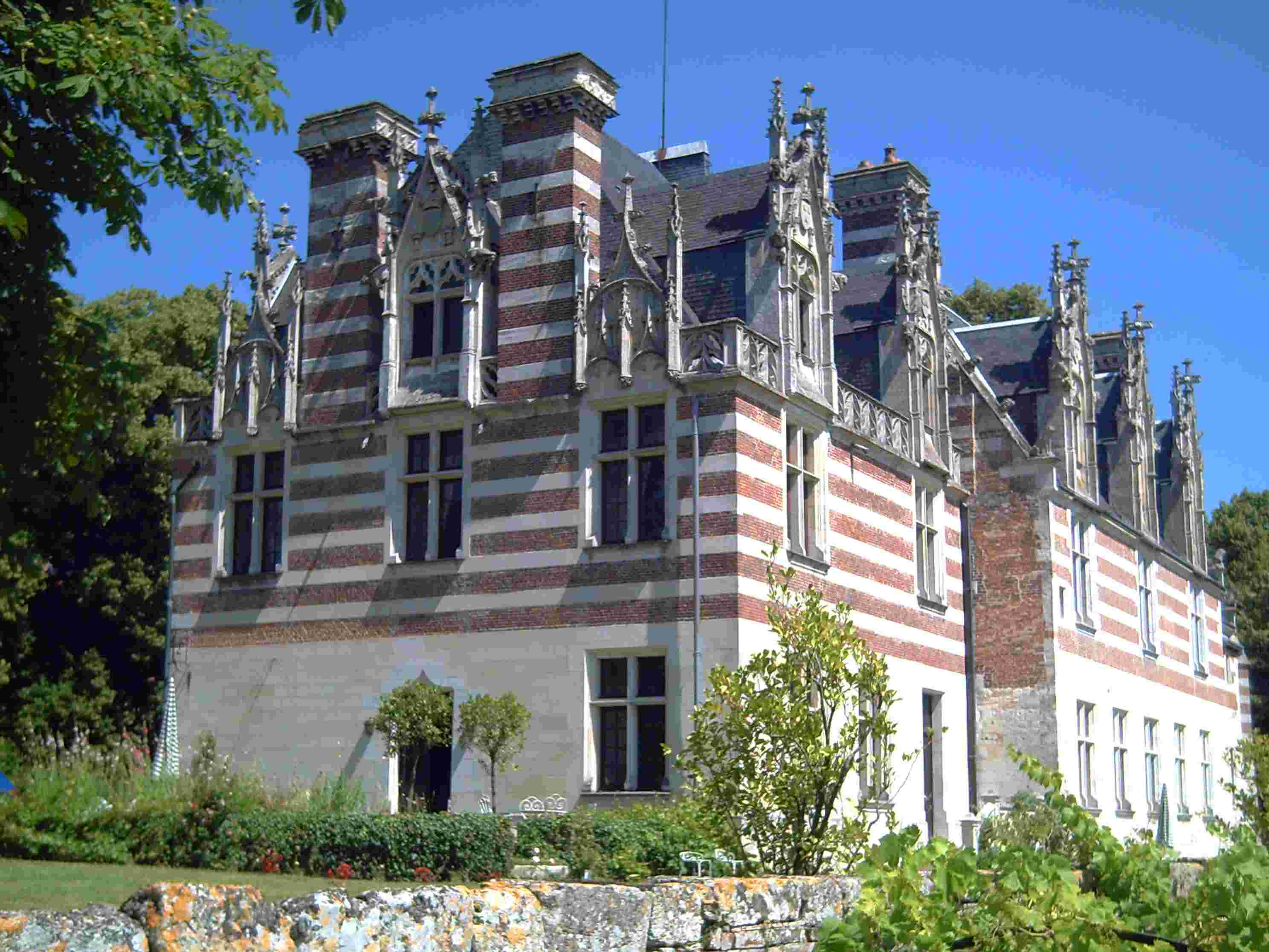 Description : Château d'Etelan, face ouest, en Normandie (76) Source : Photo Alain BOUDIER - Photo personnelle Auteur : Alain BOUDIER (Propriétaire du monument) Permission : Tous droits libres (mention du crédit obligatoire)